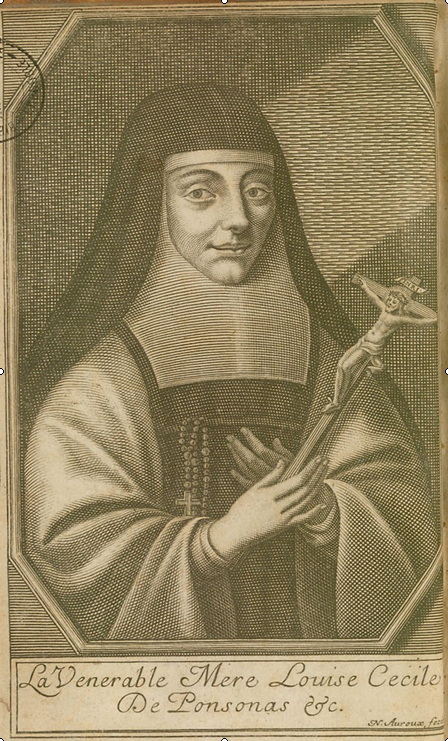 Gravure de la mère de Ponçonas